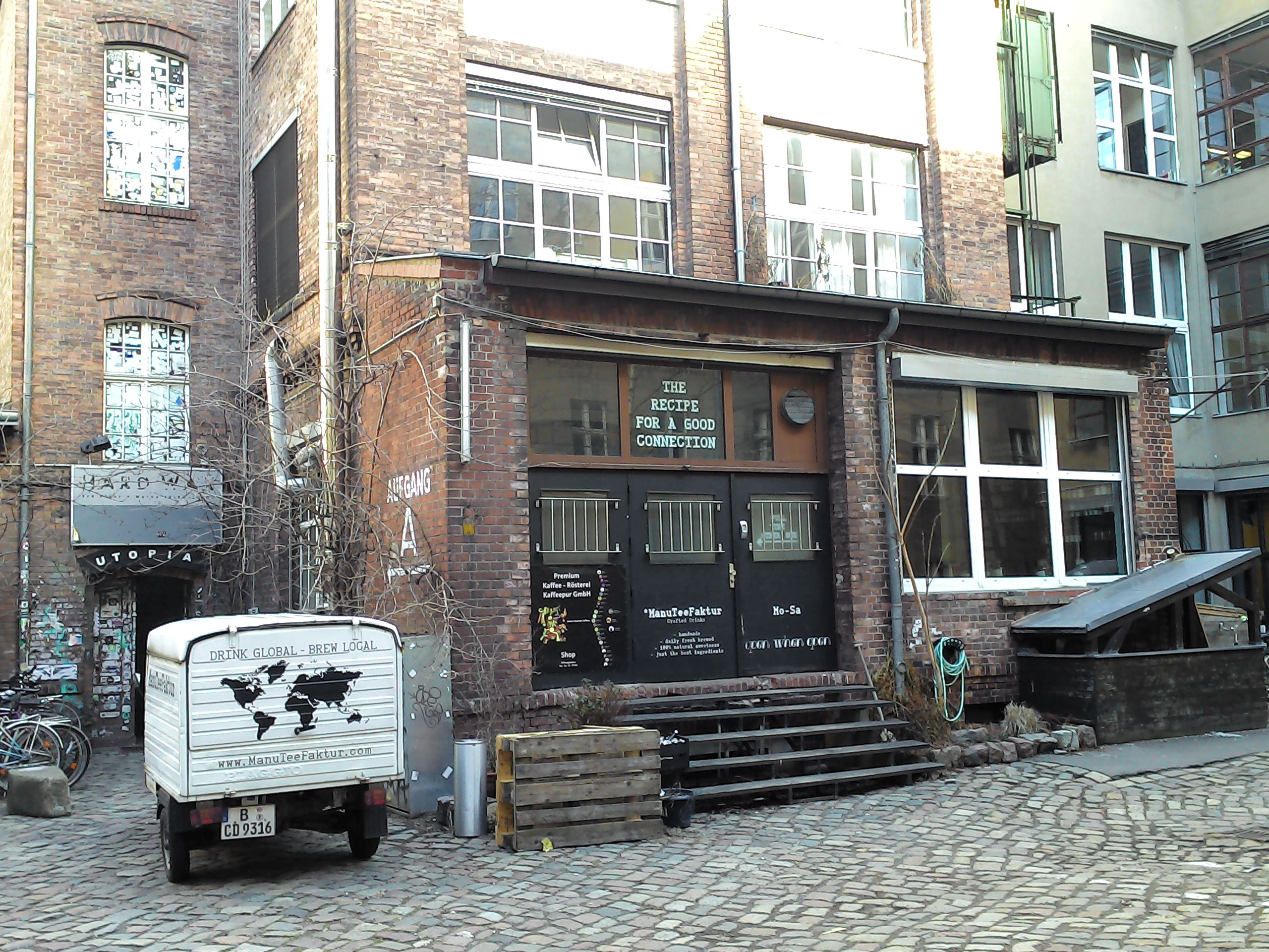 Ehemaliger Standort der Firma Oktoberdruck (bis 2001) in Berlin-Kreuzberg, Paul-Lincke-Ufer 44a.